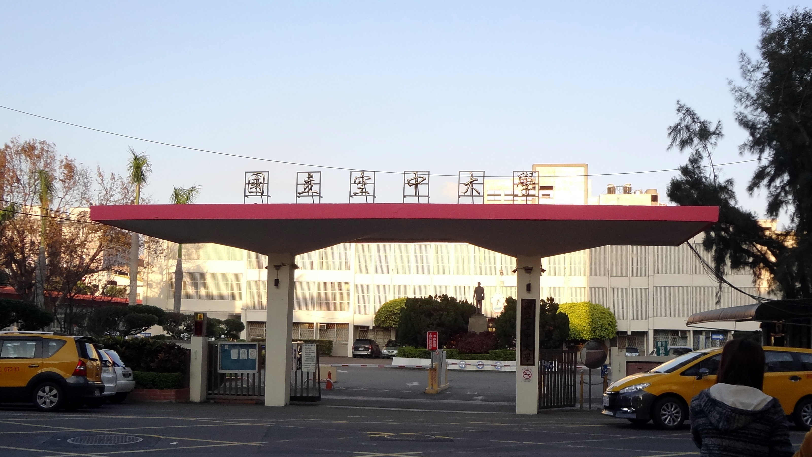 國立空中大學，位於臺灣新北市蘆洲區中正路172號。